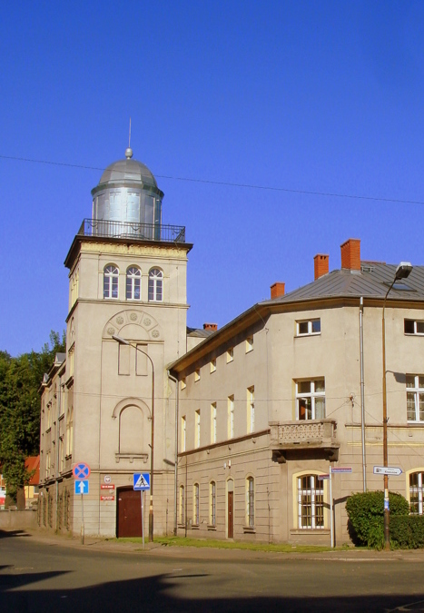 Kamienna Góra, al. Wojska Polskiego 36 - gmach sądu, obecnie Sąd Rejonowy, 1880